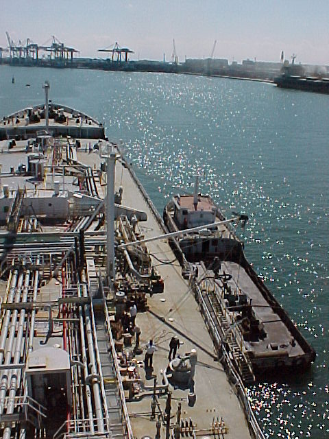 An oil tanker taking on fuel, or "bunkering."